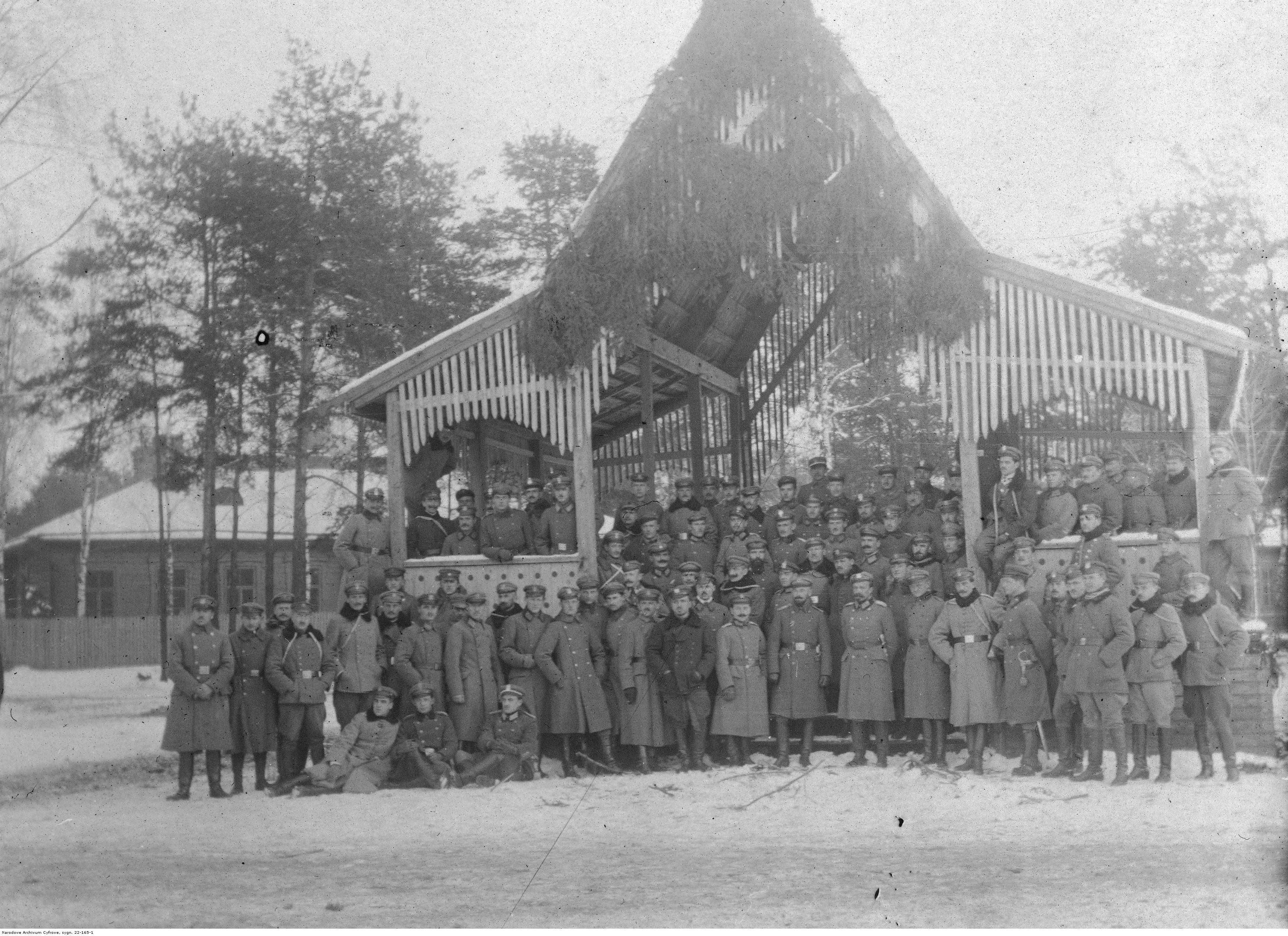 5 pułk piechoty Legionów Polskich - fotografia grupowa. Widoczni m.in.: pułkownik Edward Rydz-Śmigły (10. z prawej w 1. rzędzie - osób stojących przed schodami), majorzy Marian Kukiel, Leon Berbecki, kapitan Leopold Lis-Kula, porucznik Edward Zinth-Rzecki.